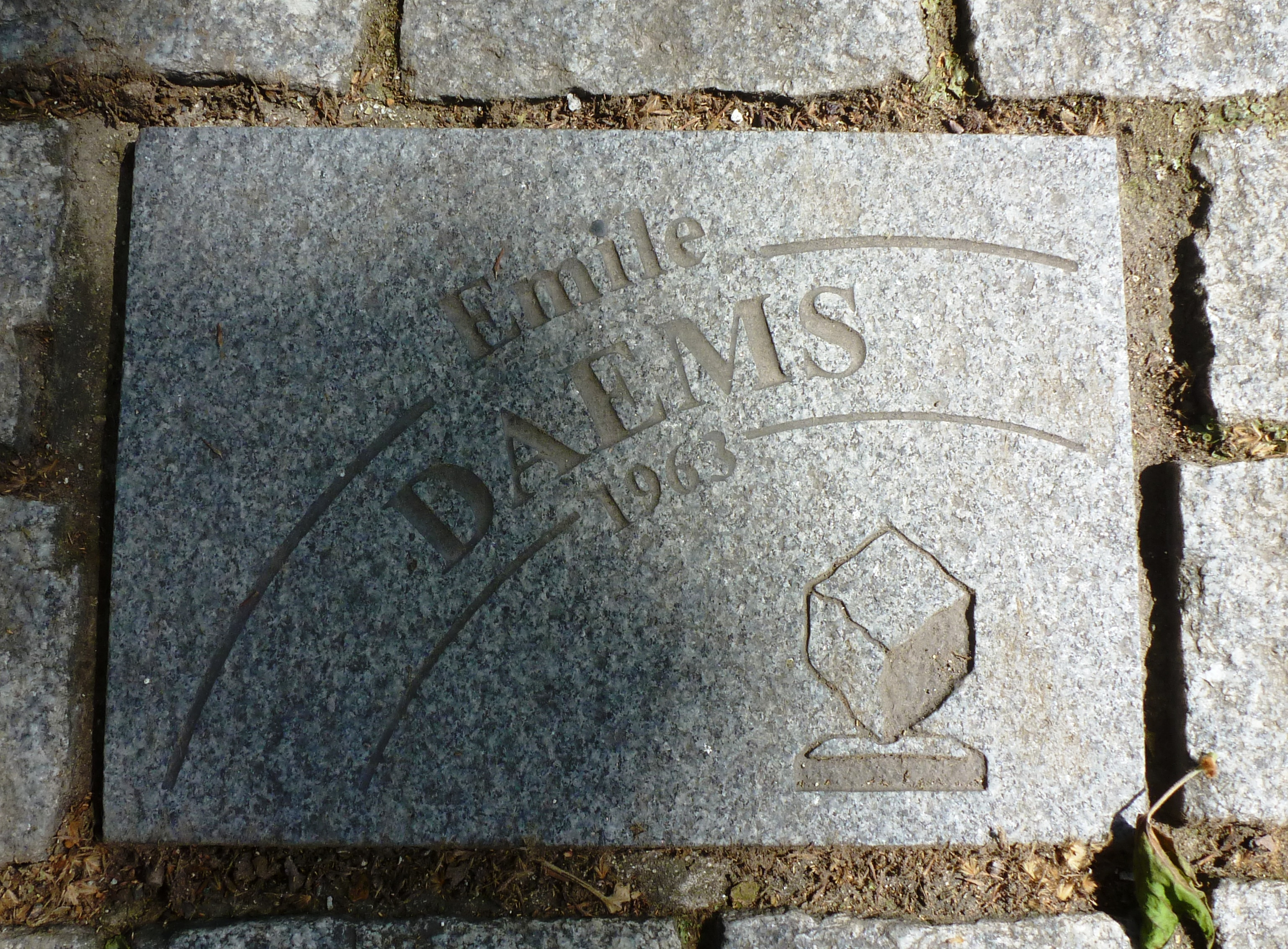 Pflasterstein für Émile Daems auf der Allée Charles Crupelandt in Roubaix